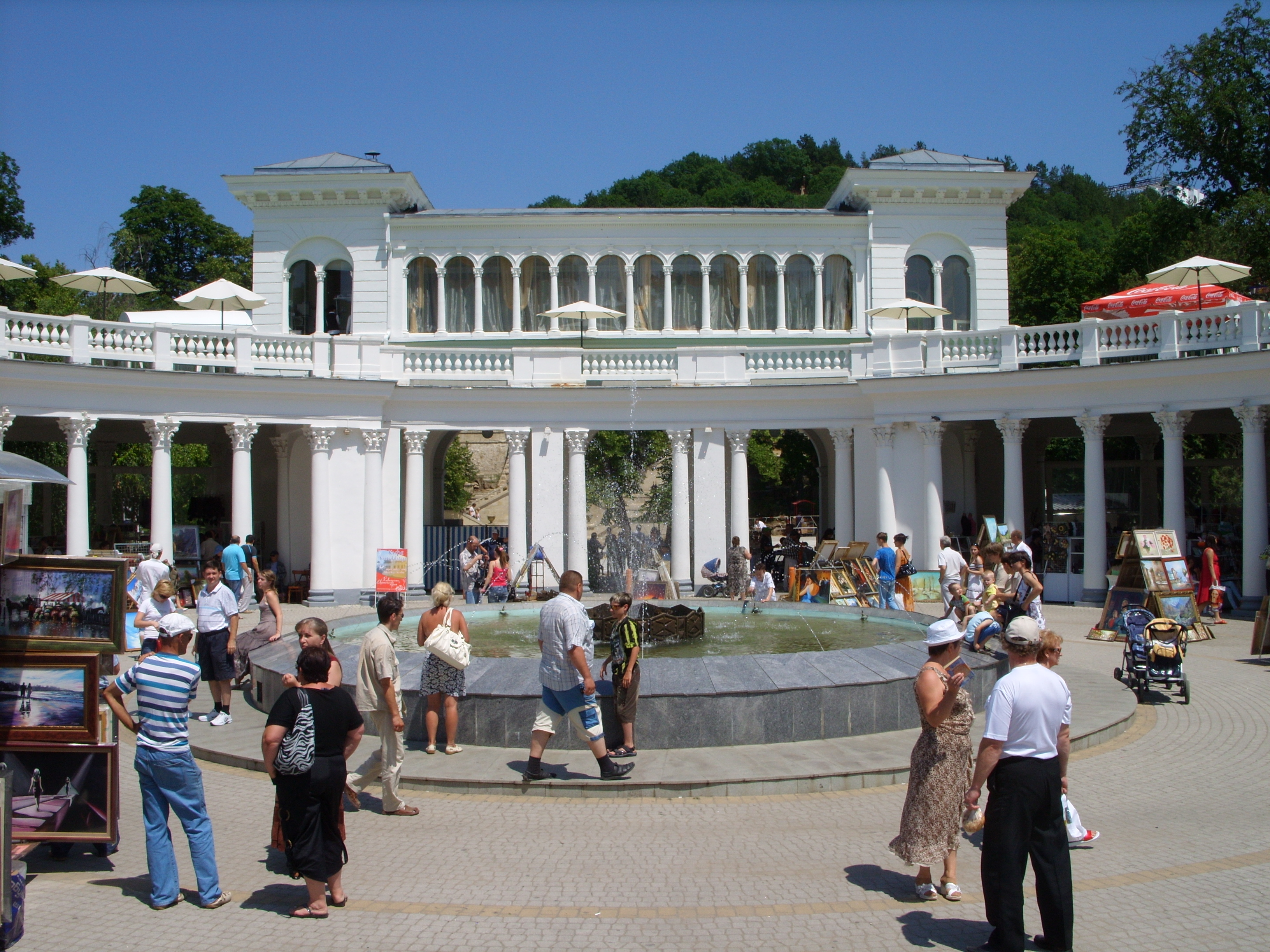 На экскурсии из Железноводска, июль 2009 г.